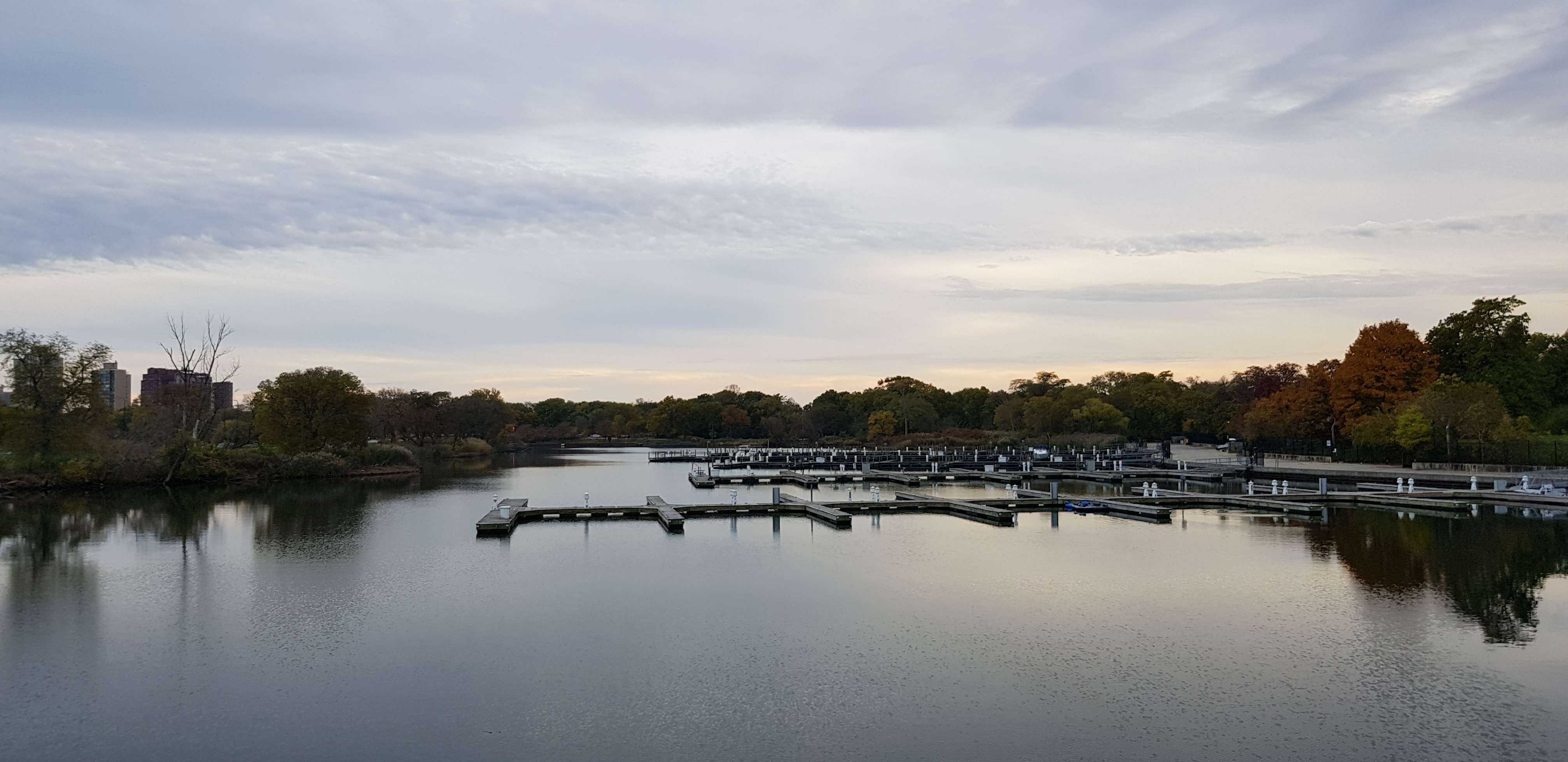 Laguna sur del Jackson Park en Chicago